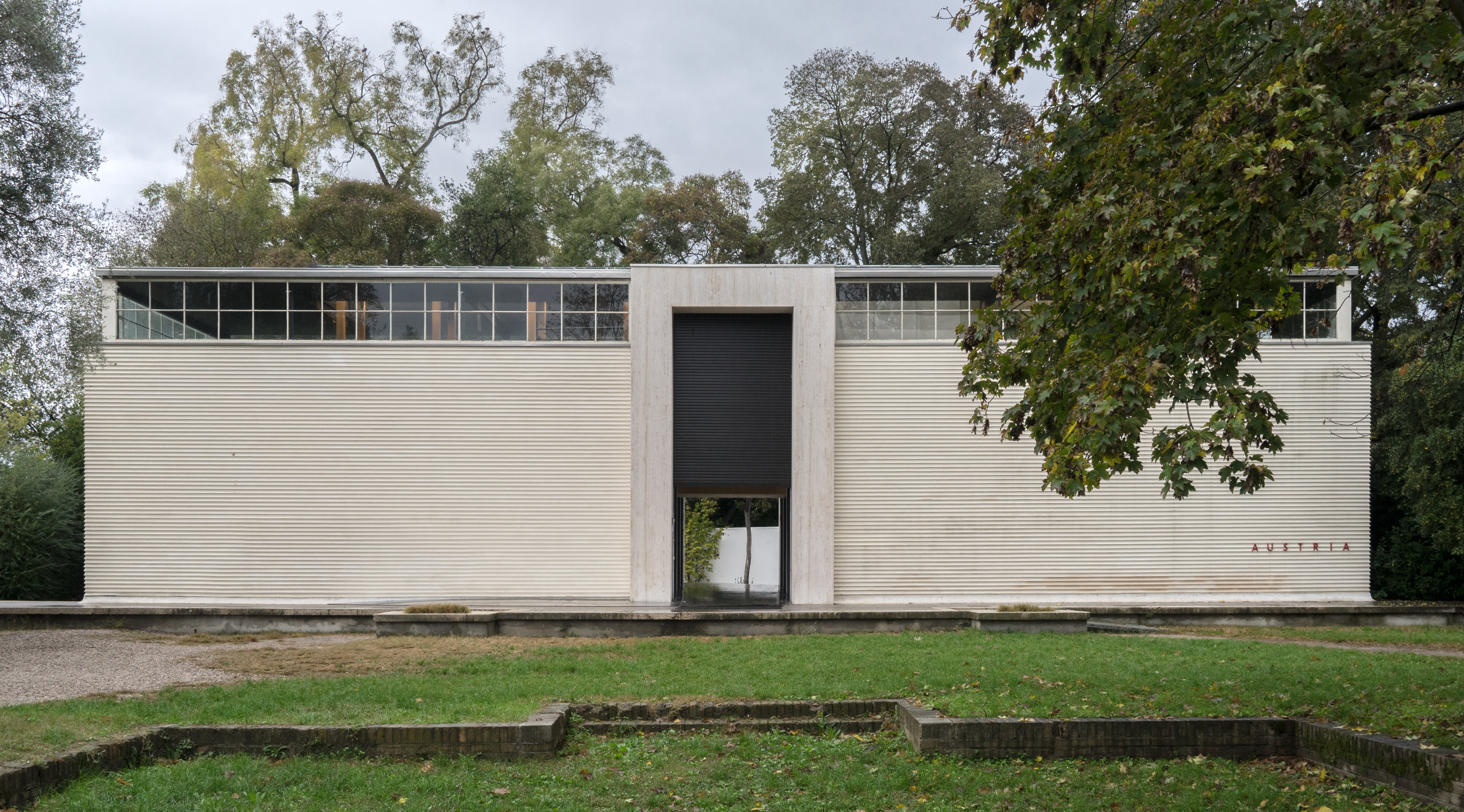 Biennale Venedig, Austria Pavillon, Josef Hoffmann 1